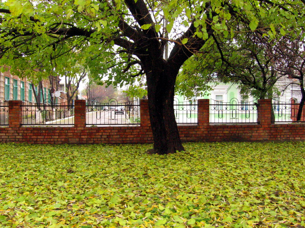 Ейск в конце ноября